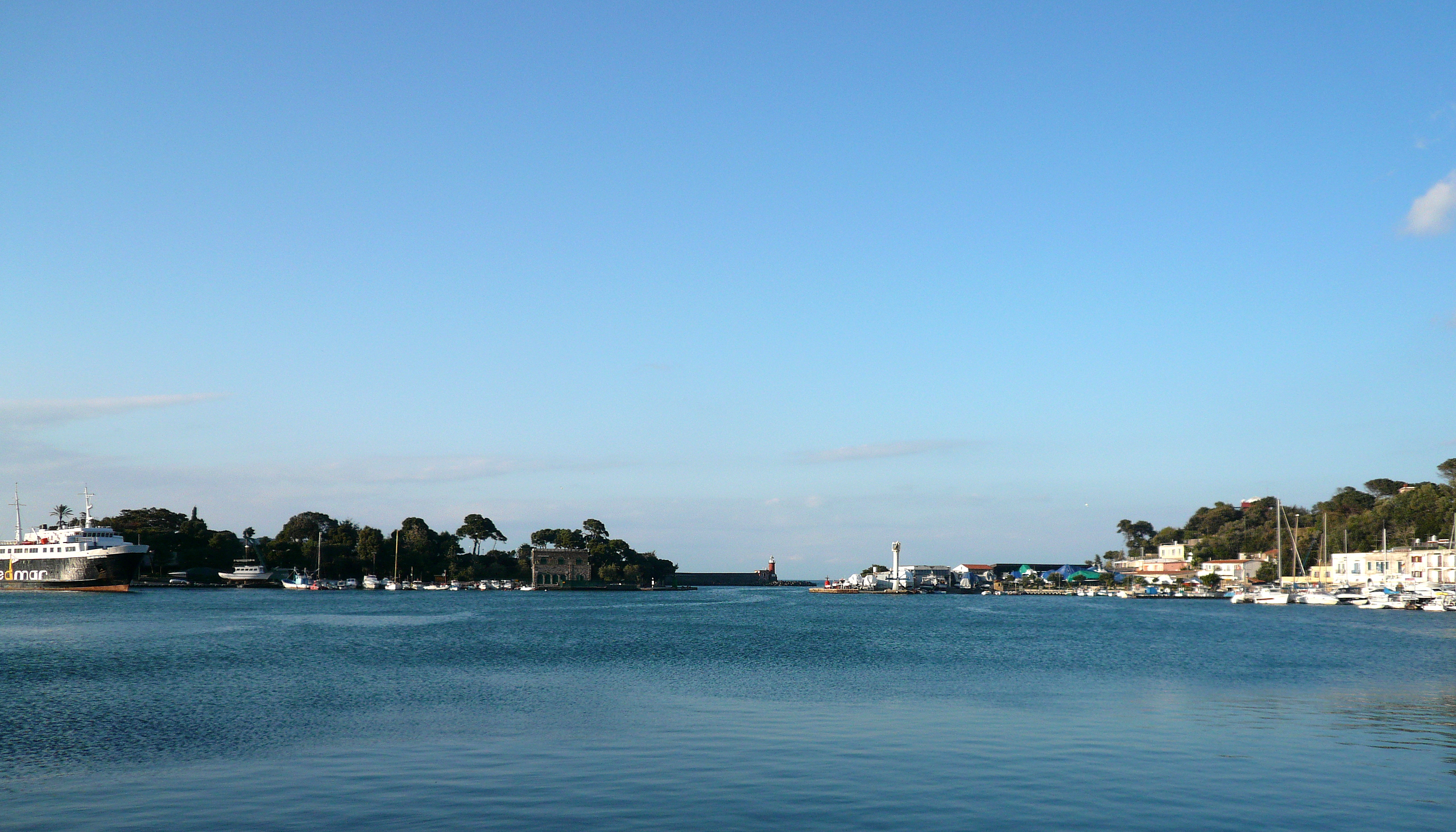 Il porto di Ischia è il principale approdo dell'isola ed è sito nel comune omonimo. Il bacino, di forma circolare, è quanto resta di un antico lago vulcanico, collegato al mare nel 1854 per volere di Ferdinando II proprio allo scopo di farne un porto. Autore foto: Roberto De Martino